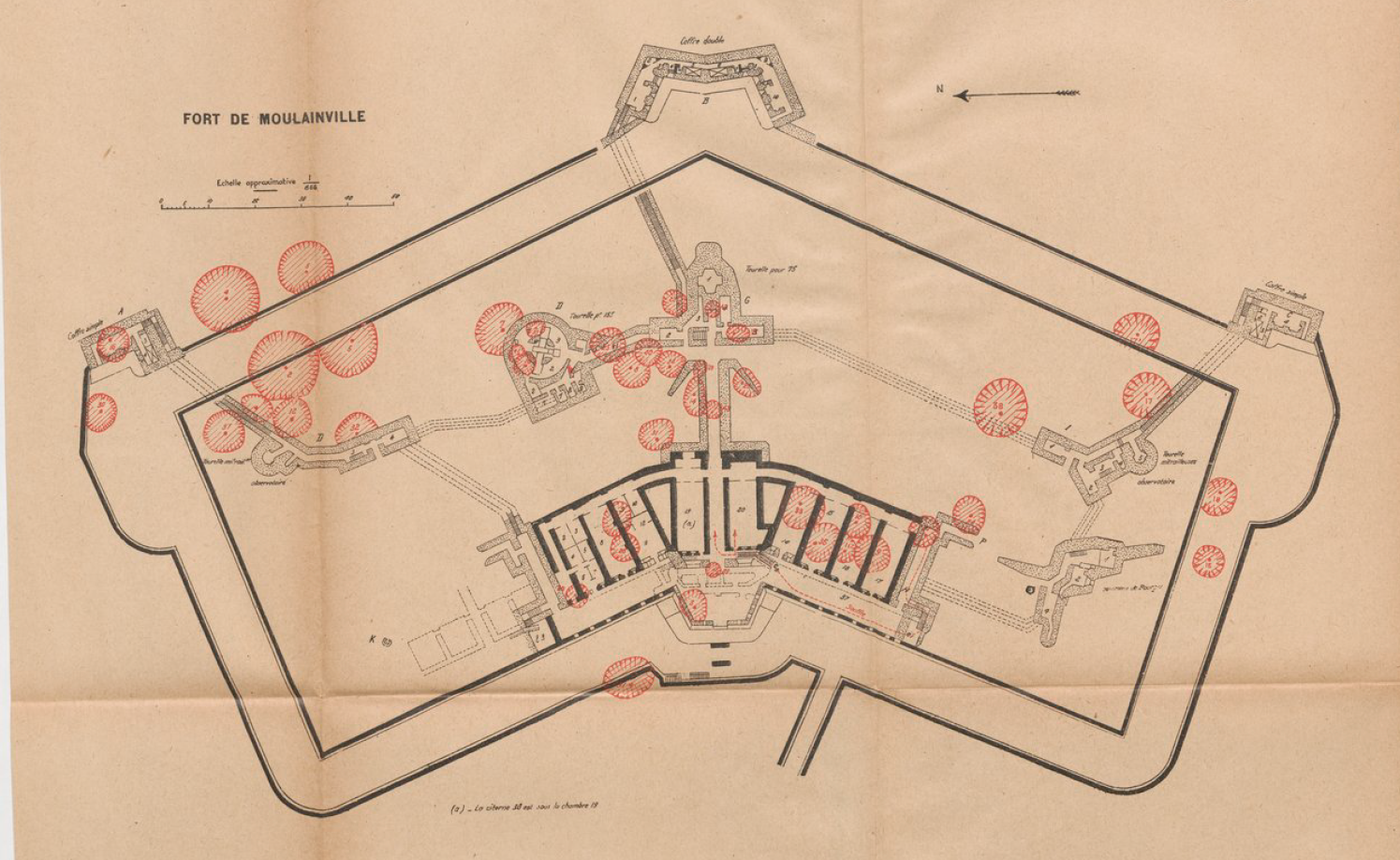 Plan du fort de Moulainville avec les principaux impacts d'obus (ceux de gros calibre) reçus en 1916.